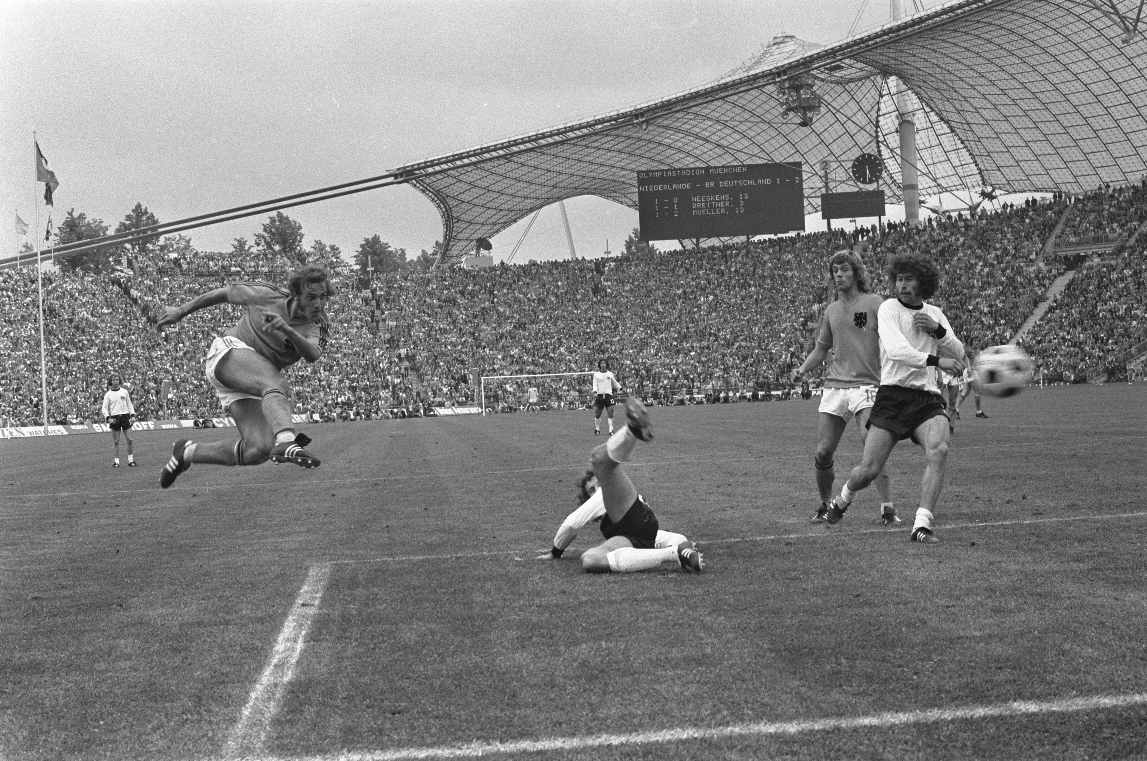 München, 7 juli 1974. Finale wereldkampioenschap voetbal 1974 in Munchen, West Duitsland tegen Nederland 2-1. Neeskens (l) schiet; op de grond Beckenbauer; rechts Rep en Breitner.